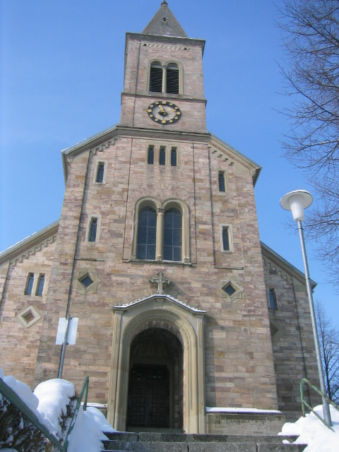 Katholische Kirche Bonndorf, Neubau von 1850.